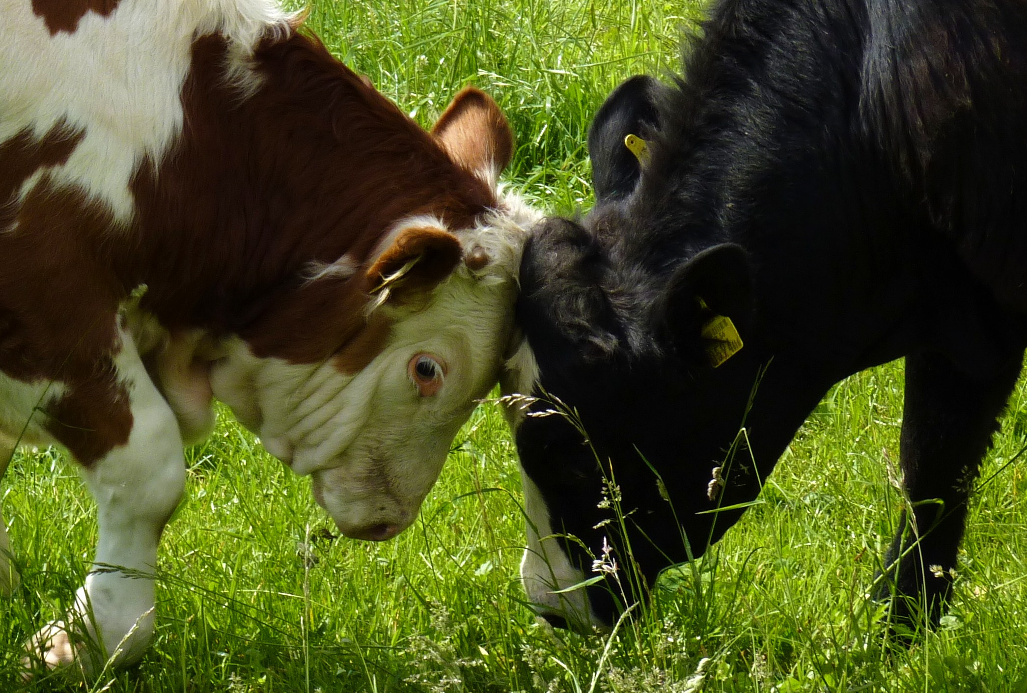 Rind (Bos primigenius taurus) 2011-05-25